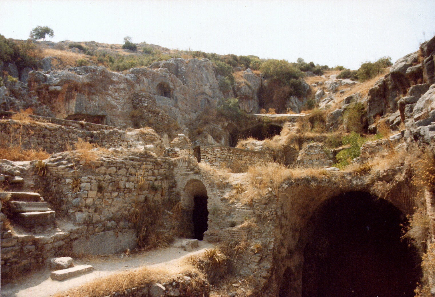 Siebenschläferhöhle bei Ephesos, Westtürkei